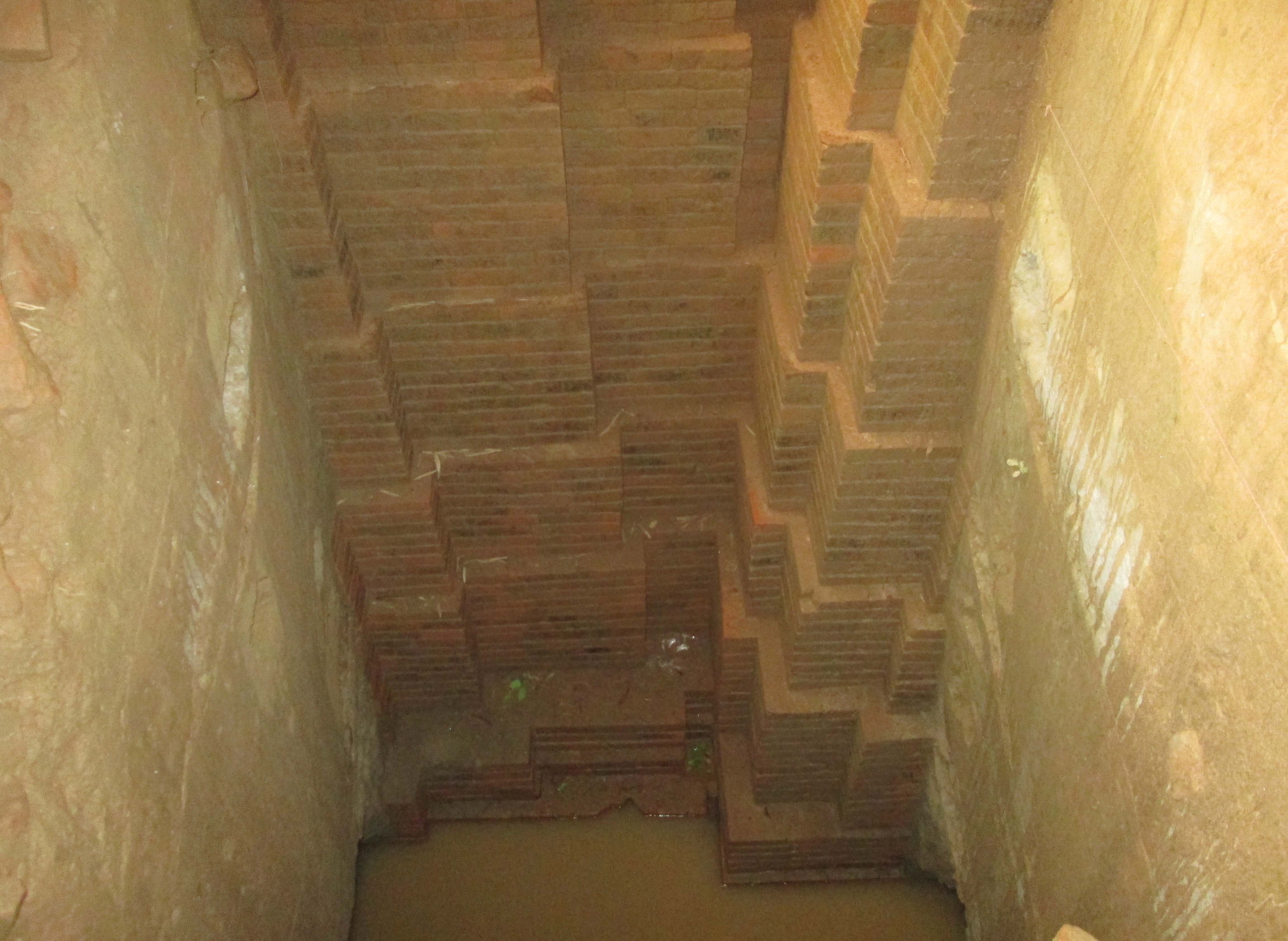 প্রাচীন বিষ্ণু মন্দির কাহারোল